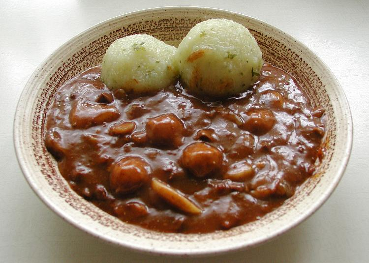 Mockturtle-Suppe, verfeinert mit Champignon-Scheiben, an Kartoffelklößen (Norddeutsche Küche)